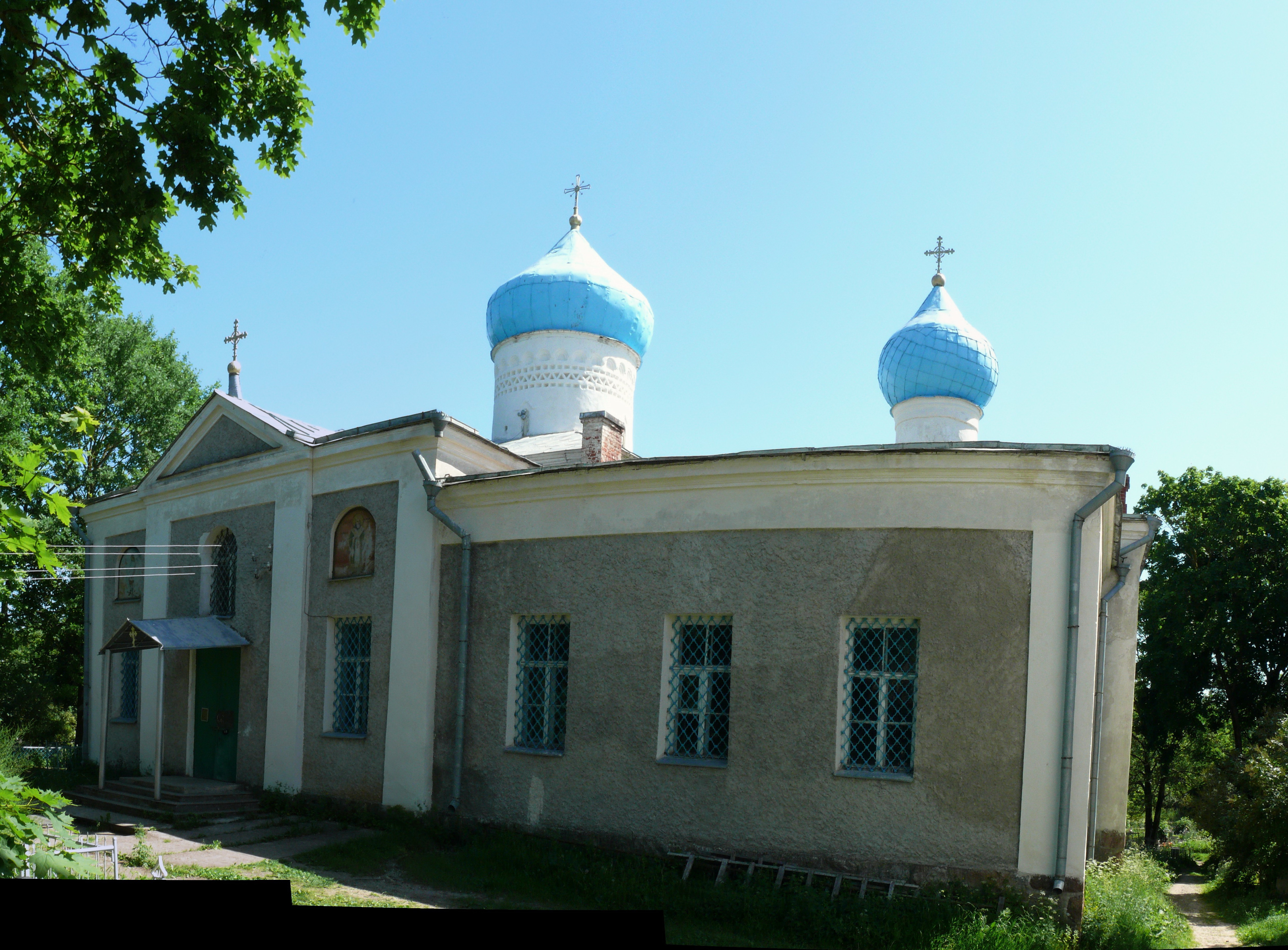 церковь св. Георгия Победоносца на погосте Сенно